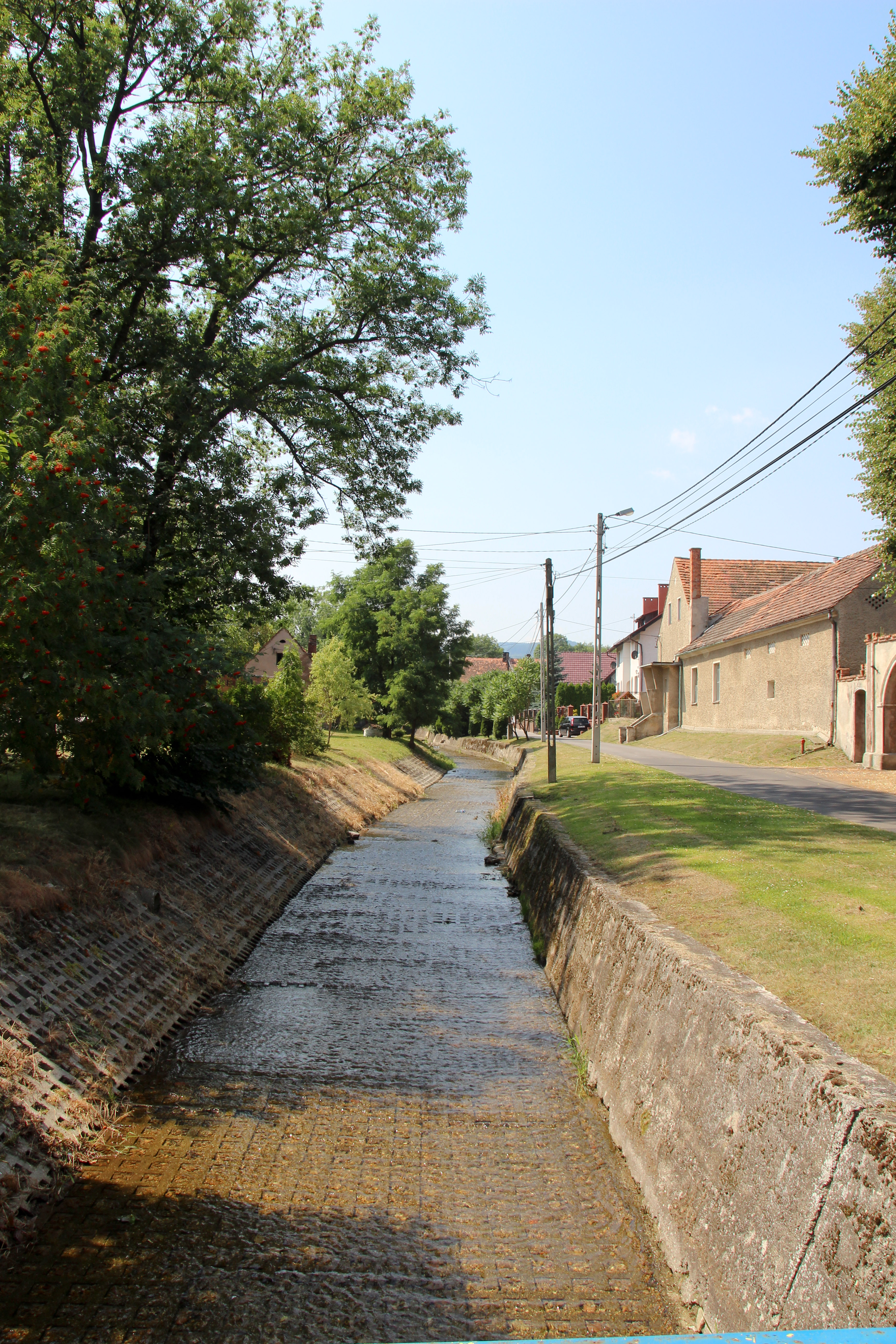 Gościce – wieś w Polsce, w województwie opolskim, w powiecie nyskim, w gminie Paczków.